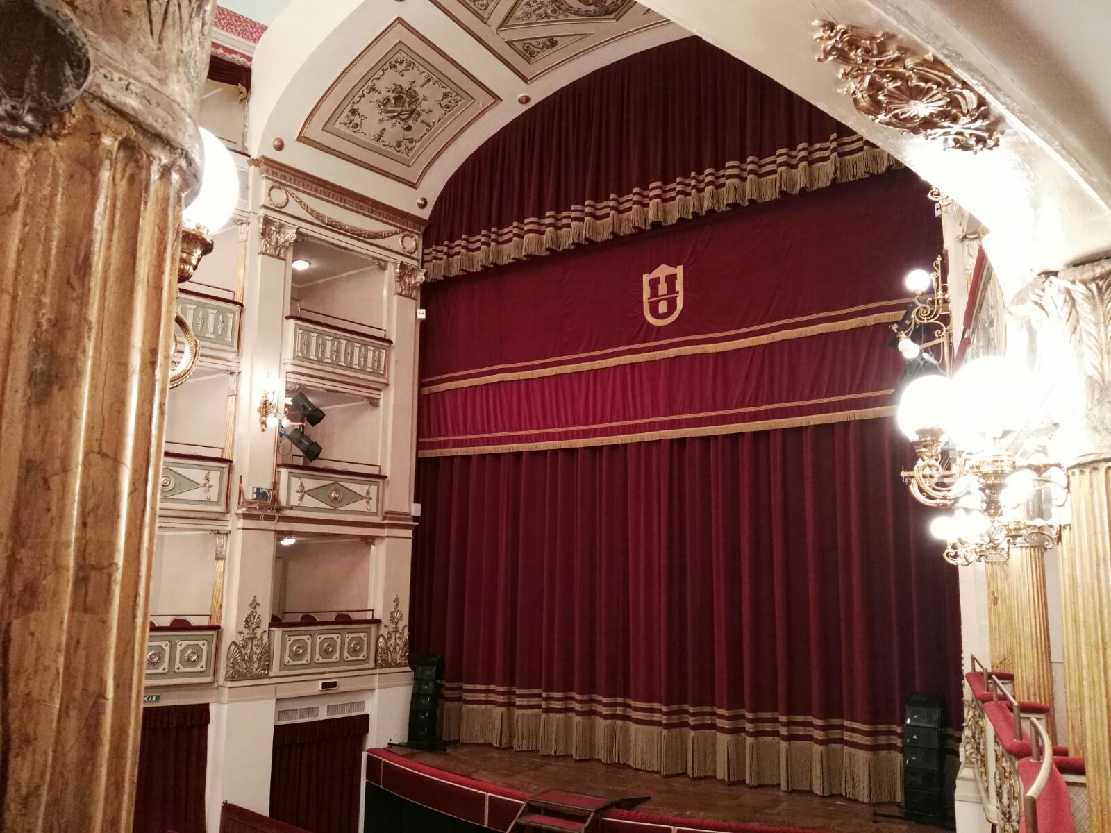 Interno del teatro visto da un palco